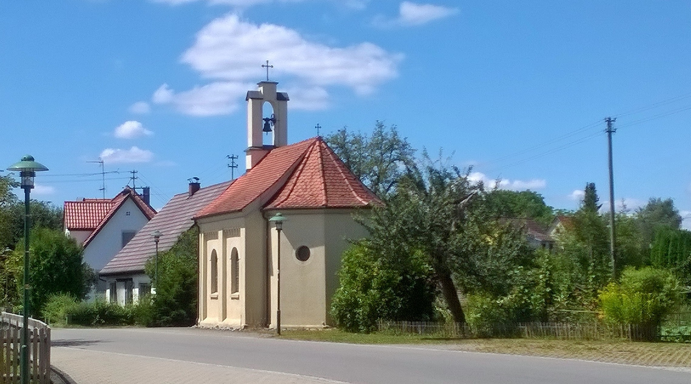 Kapelle St. Joseph im Aulendorfer Stadtteil Tannhausen